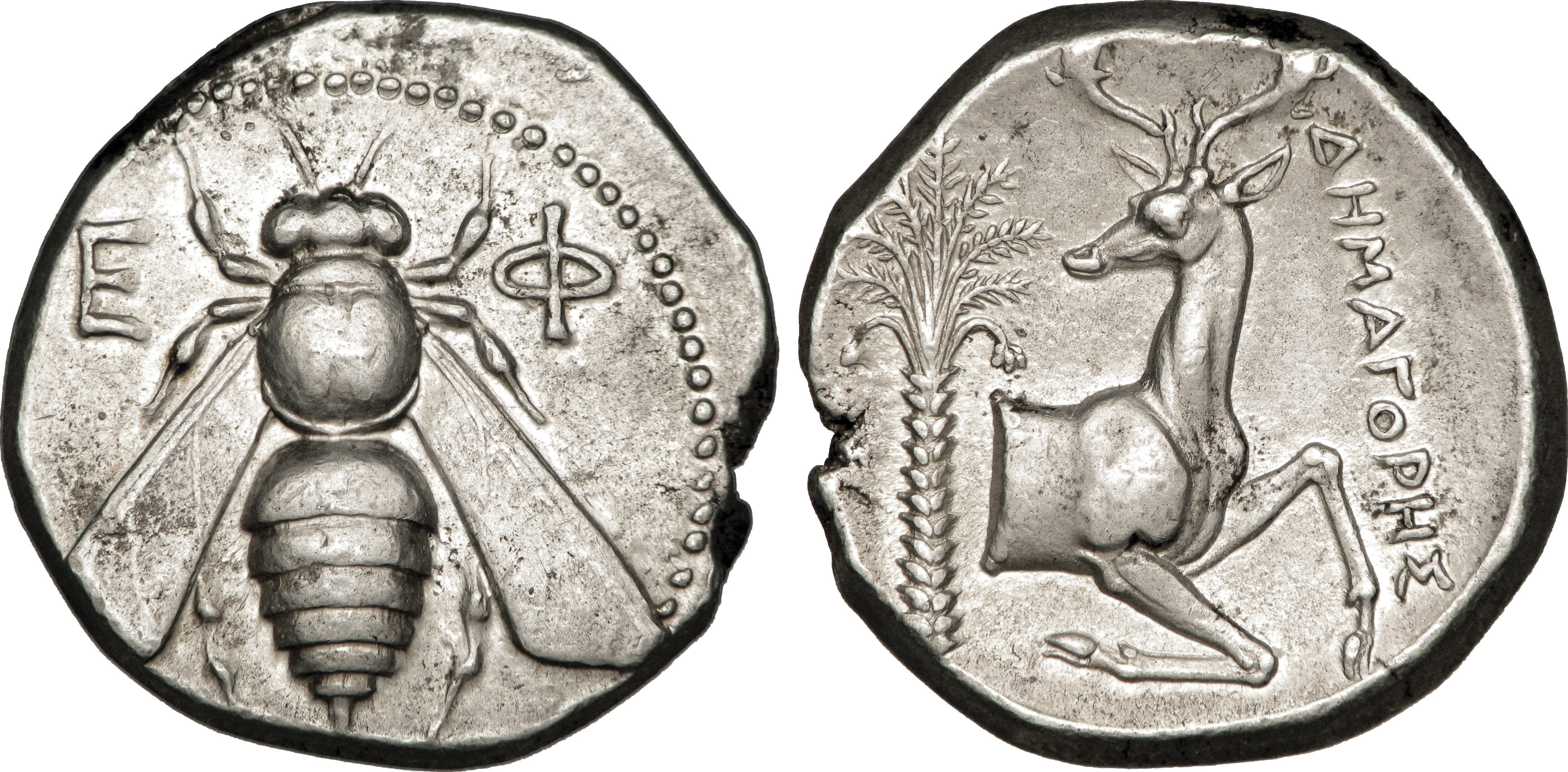 Nom de l'atelier : Ionie, Éphèse Métal : argent Diamètre : 24mm Axe des coins : 12h. Poids : 15,33g Description avers : Abeille vue de dessus ; grènetis circulaire perlé. Légende avers : E-F Description revers : Protomé de cerf à droite, agenouillé, tournant la tête à gauche ; dans le champ à gauche, un palmier. Légende revers : ΔΗΜΑΓΟΡΗΣ dēmagorēs Traduction revers : (Démagorès).